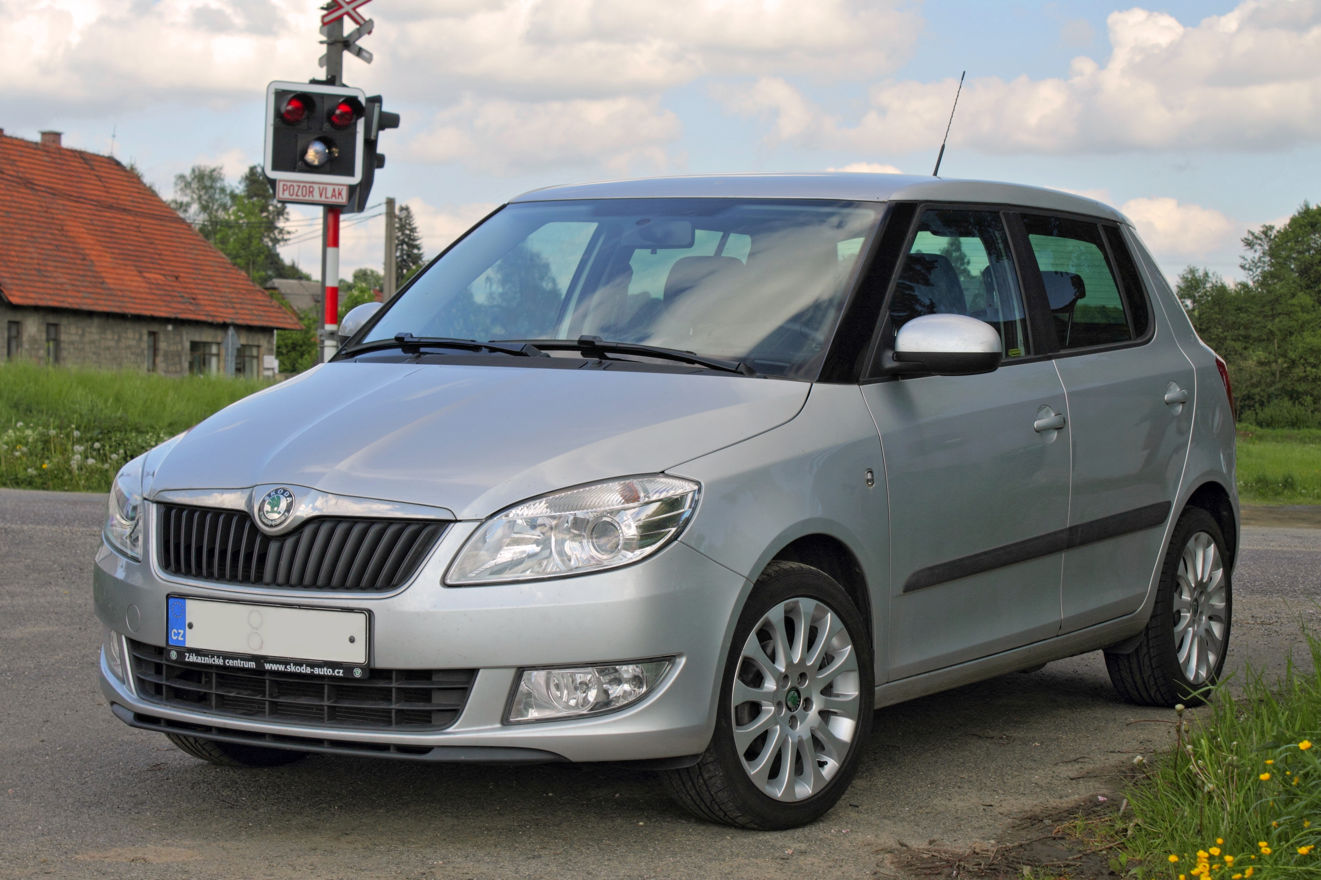 Stříbrná Škoda Fabia II (po faceliftu)